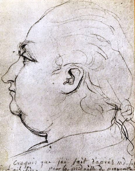 Croquis de Pierre-André de Suffren réalisé vers 1785-1788.